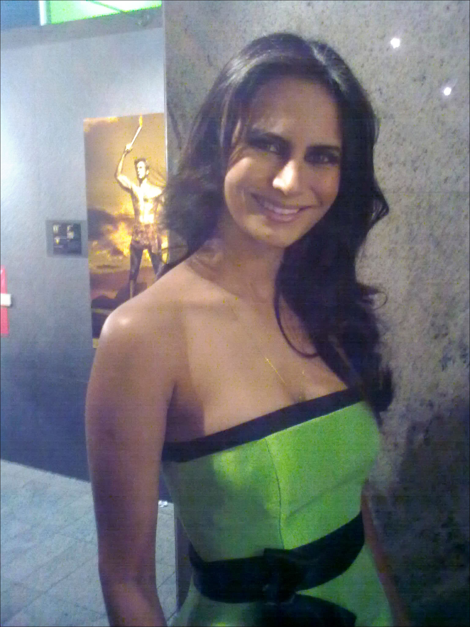 A Miss Brasil 2009 Larissa Costa na vernissage (noite de estreia) da mostra de fotos do artista plástico Thiago Cóstackz (ela foi a modelo numa delas) no shopping center Center3, Av. Paulista em São Paulo-SP, Brasil.